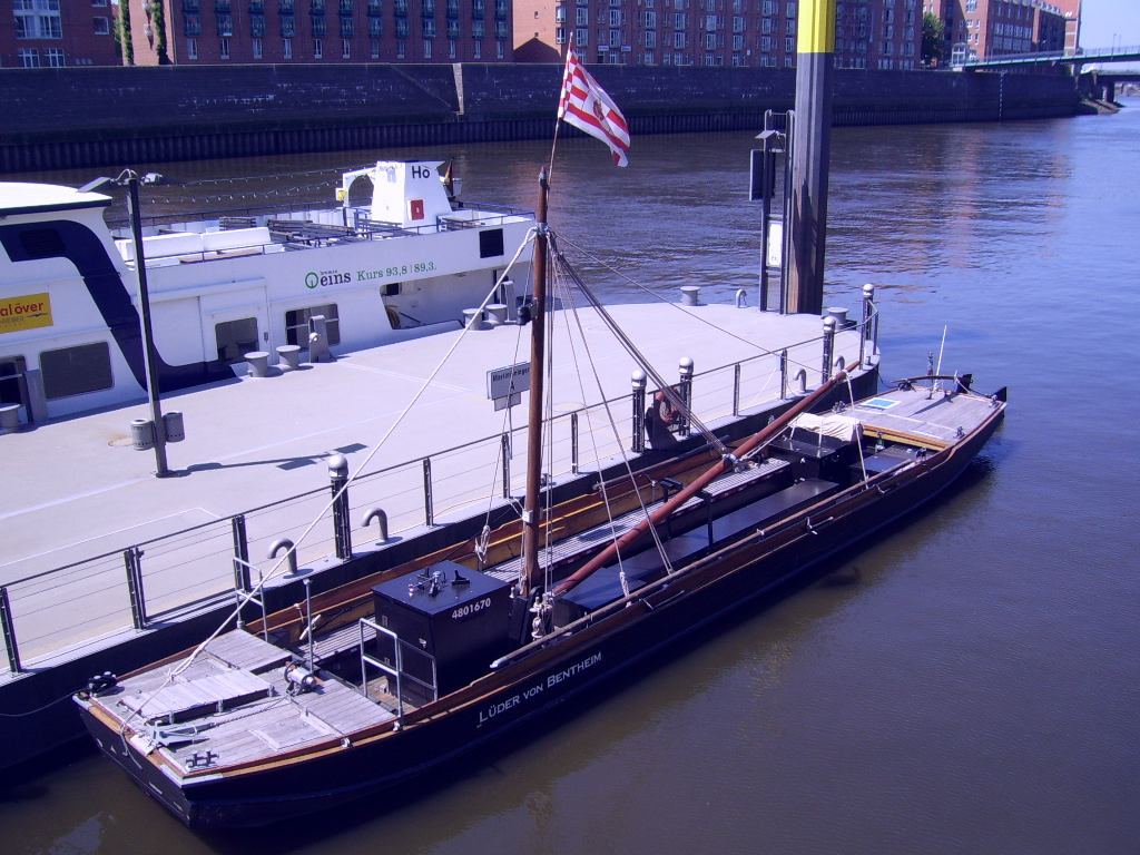 The river barge Lüder von Bentheim in Bremen Die Weserkahnnachbau Lüder von Bentheim in Bremen A Lüder von Bentheim, egy egykori kahn rekonstrukciója Brémában